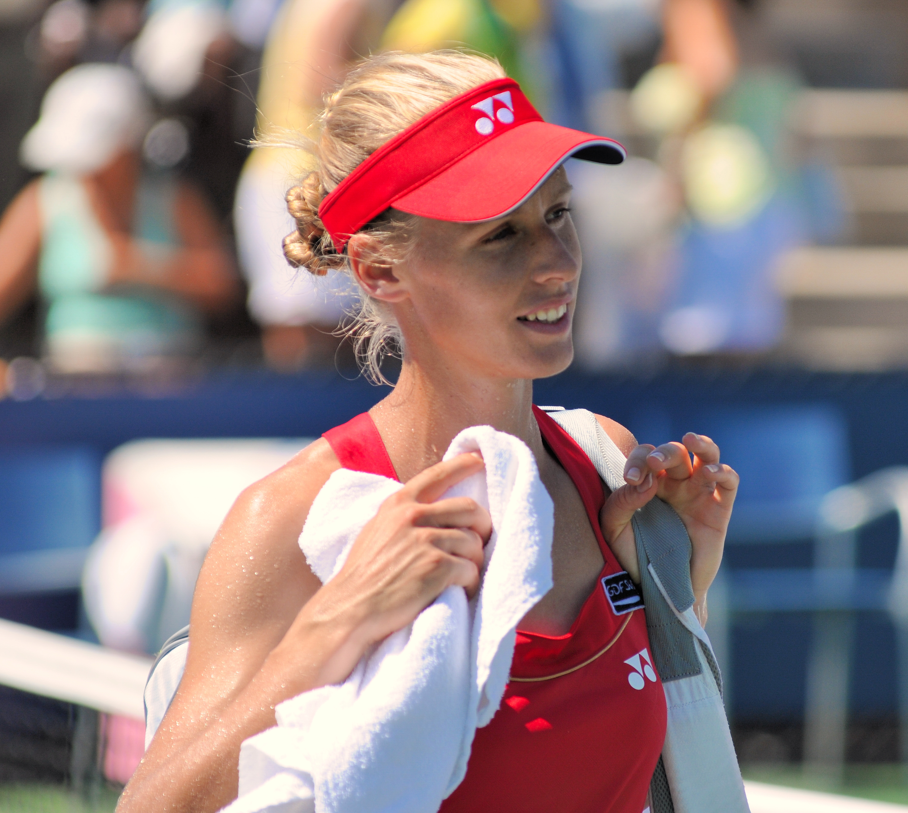 Elena Dementieva - US Open 2010